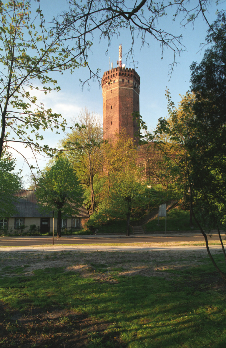 Człuchów, wieża zamkowa